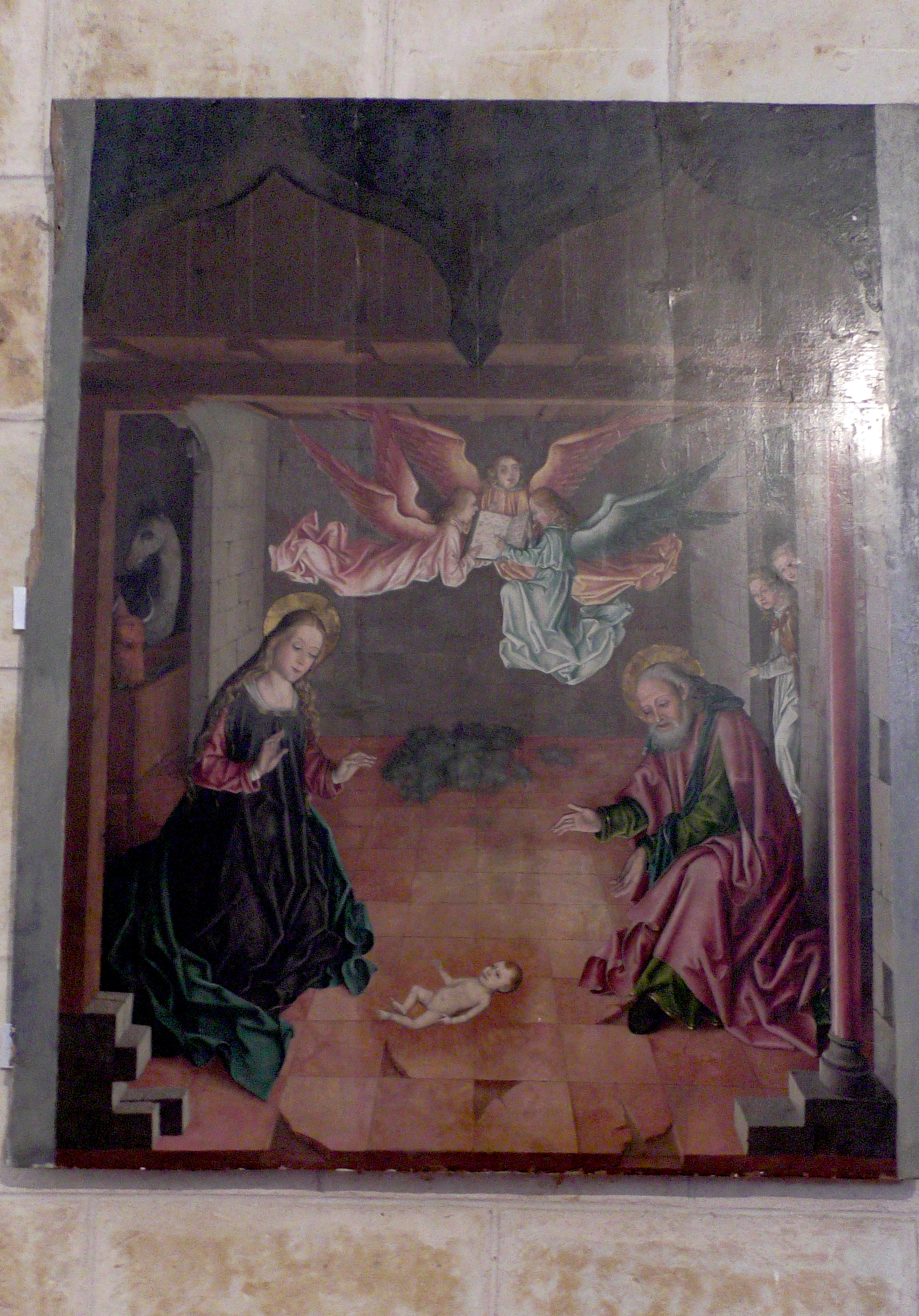 Iglesia de la Asunción